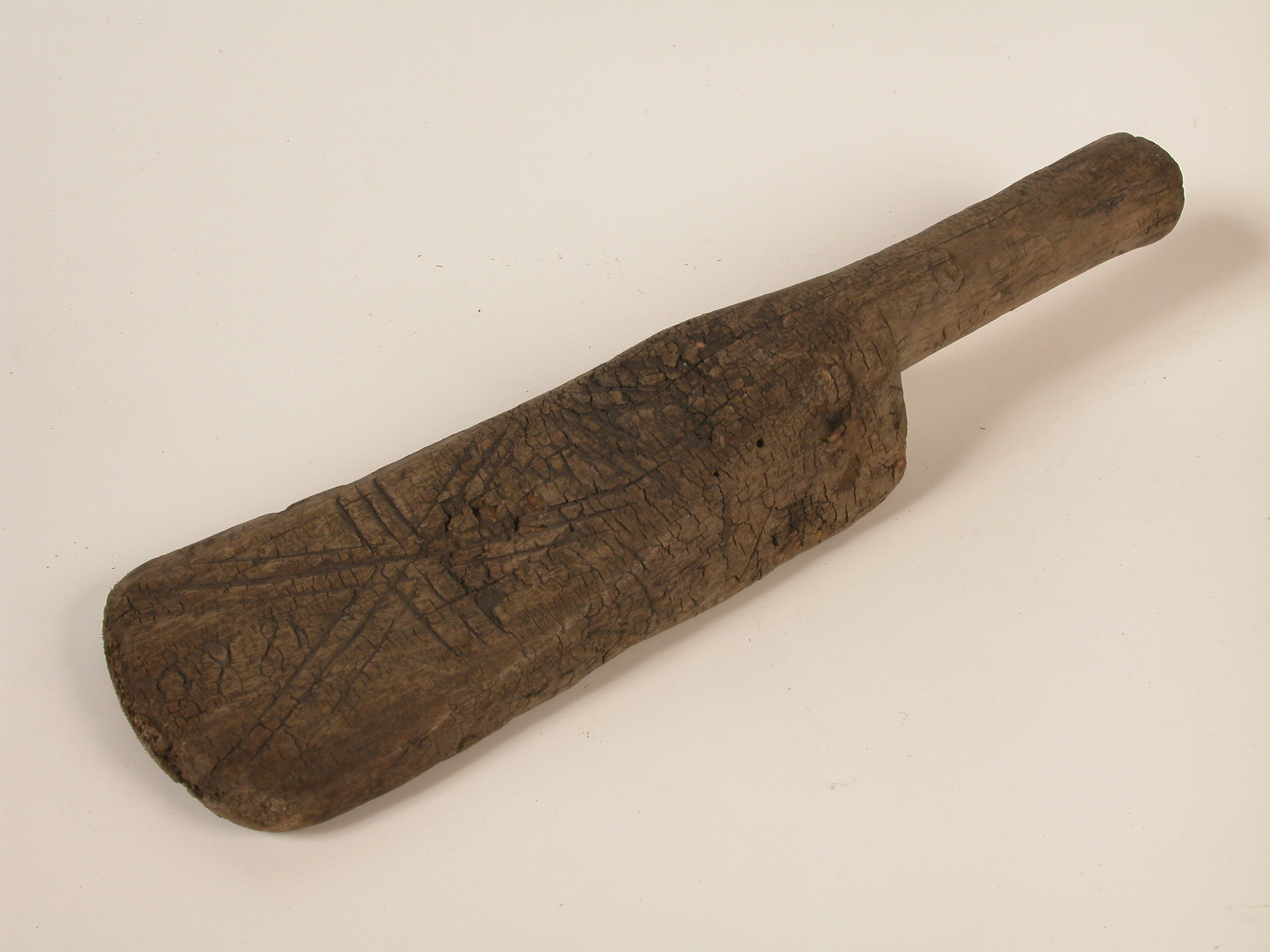 Pesukurikas